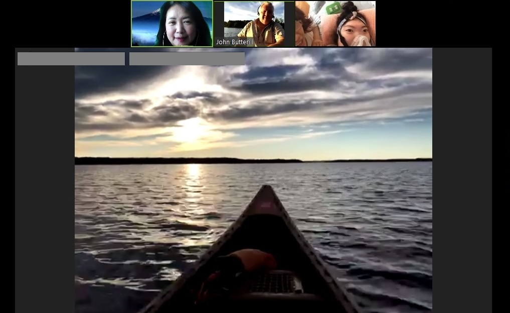 バルサム湖の夕暮れを見る辻井彩音